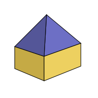 Stanová střecha - schéma